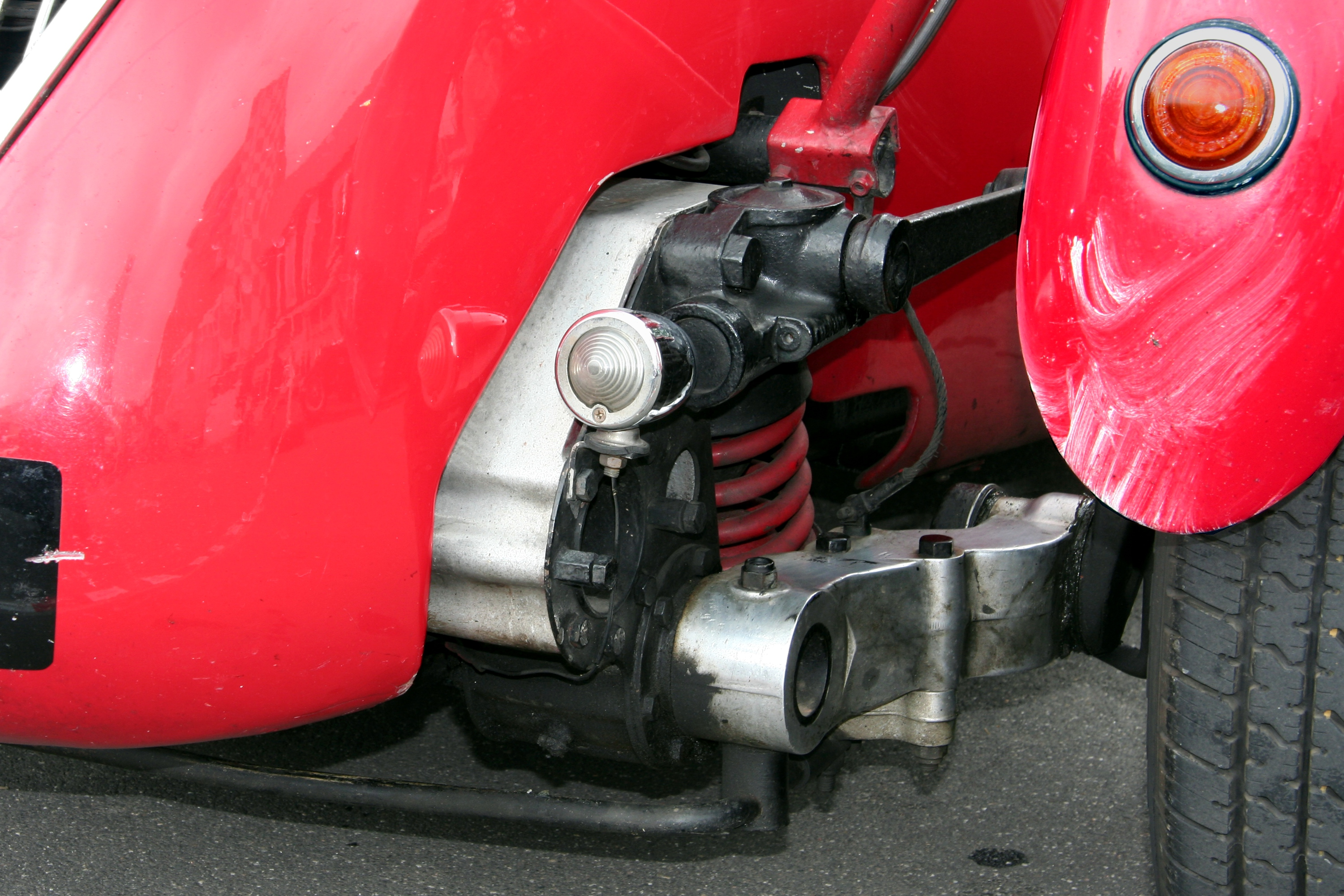 Vorderradaufhängung eines Healey Silverstone, Baujahr 1949, im historischen Fahrerlager des Nürburgrings